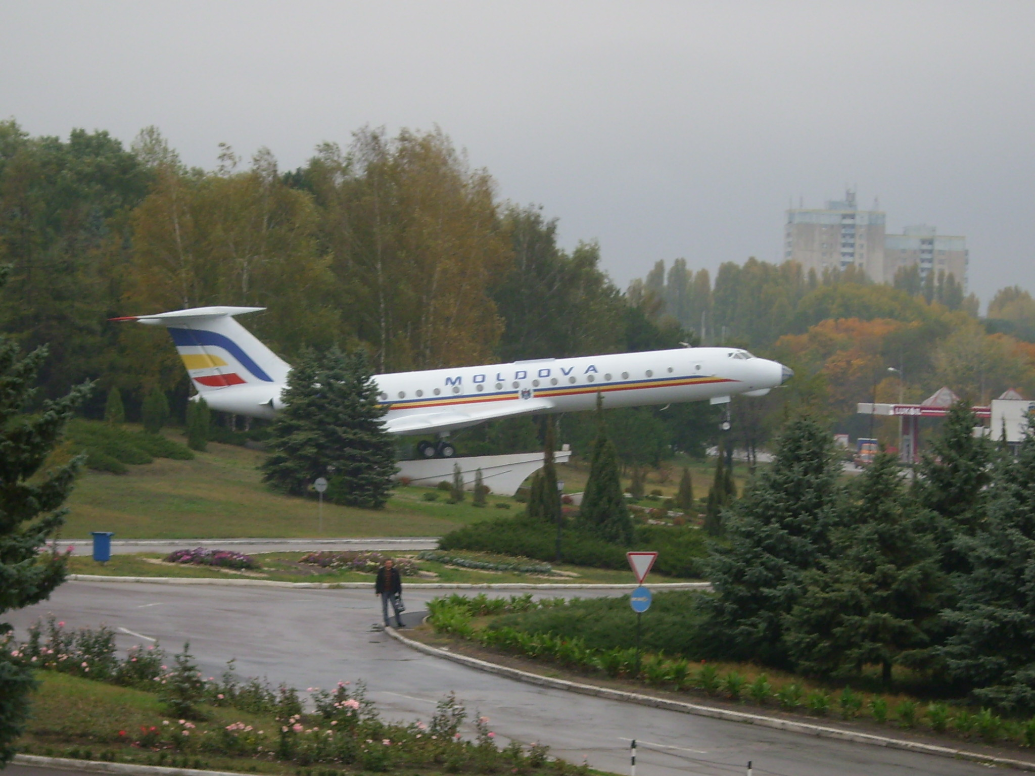 Moldova, Chisinau Airport III